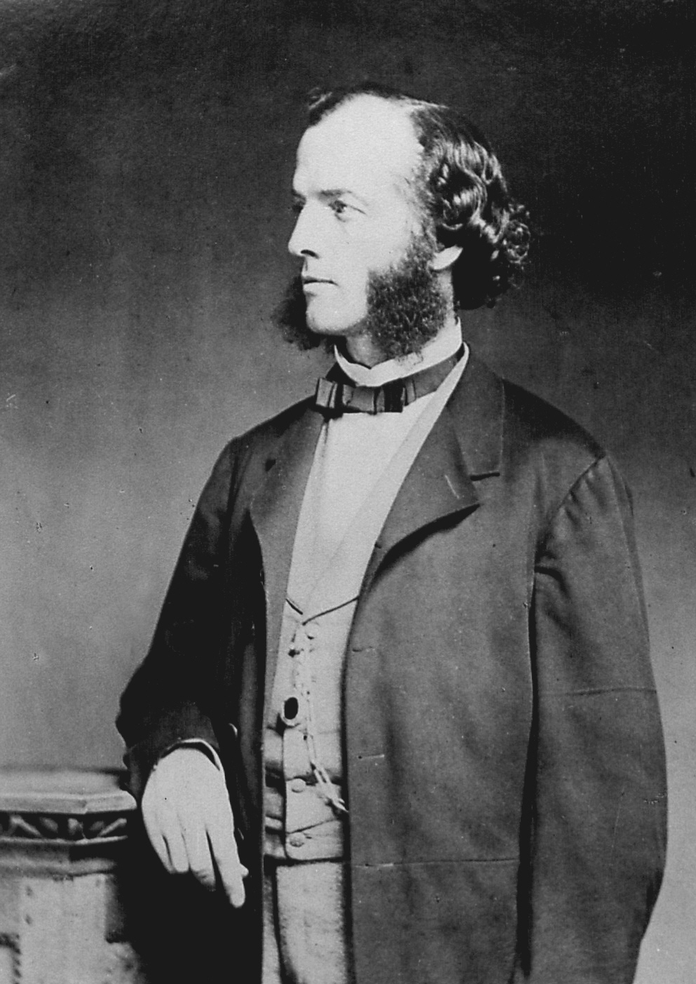 Friedrich August Kekule (* 7. September 1829 in Darmstadt; † 13. Juli 1896 in Bonn) in Heidelberg